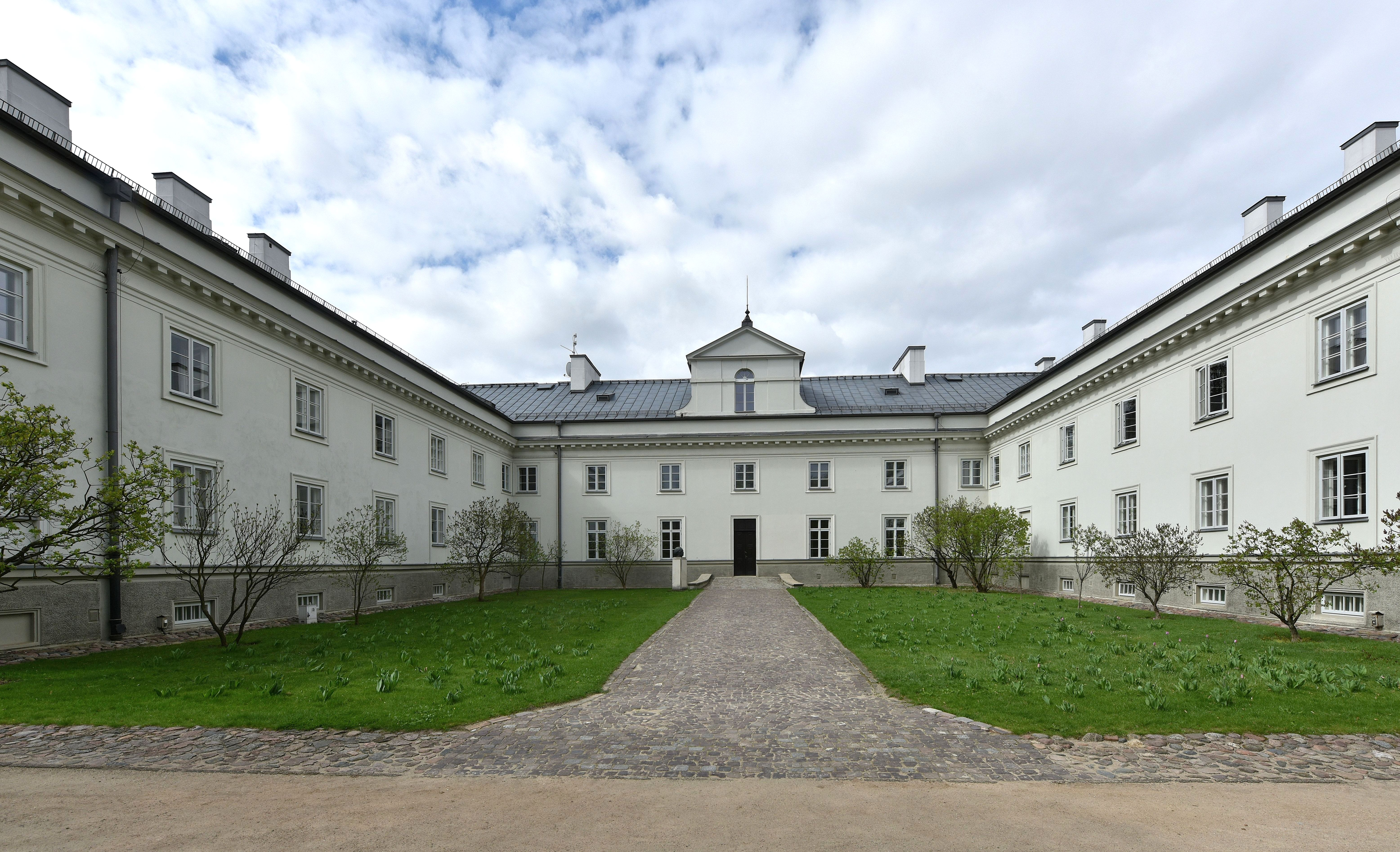 Wielka Oficyna (Podchorążówka) w Łazienkach Królewskich. Fasada wchodnia